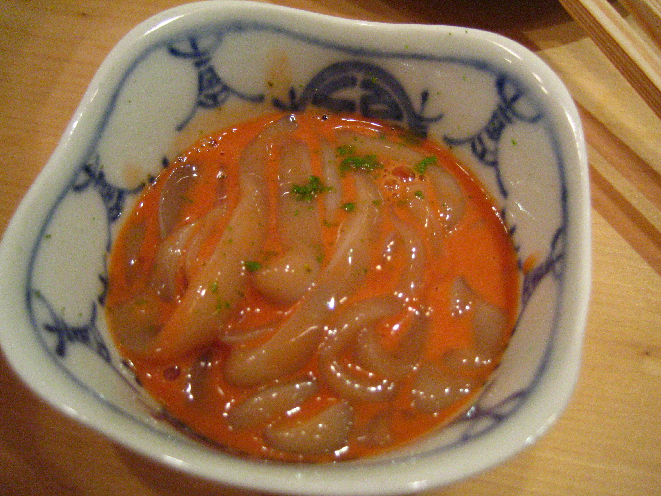 at Uotei, an seafood izakaya in Monzen-nakacho, Tokyo.塩辛